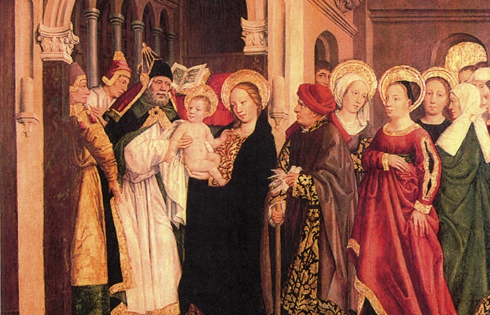 Presentació al Temple, obra d'Antoine de Lonhy a la Bob Jones University de Greenville (Carolina del Sud), 1480